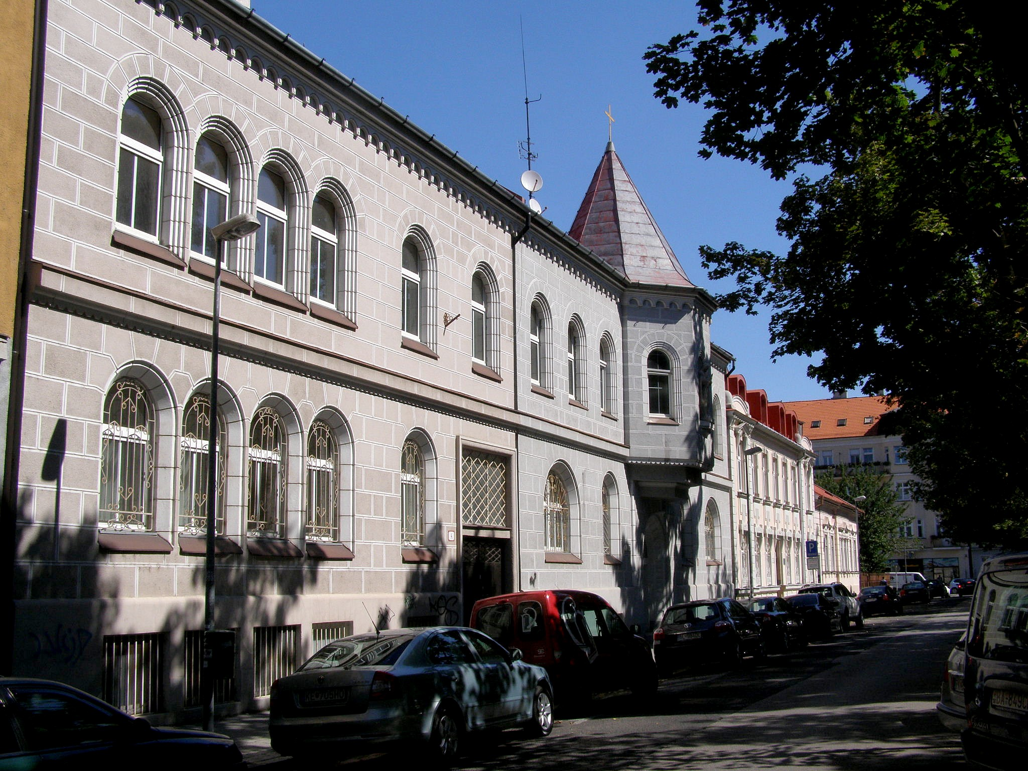 Jakubovo námestie č. 5. Rehoľný dom